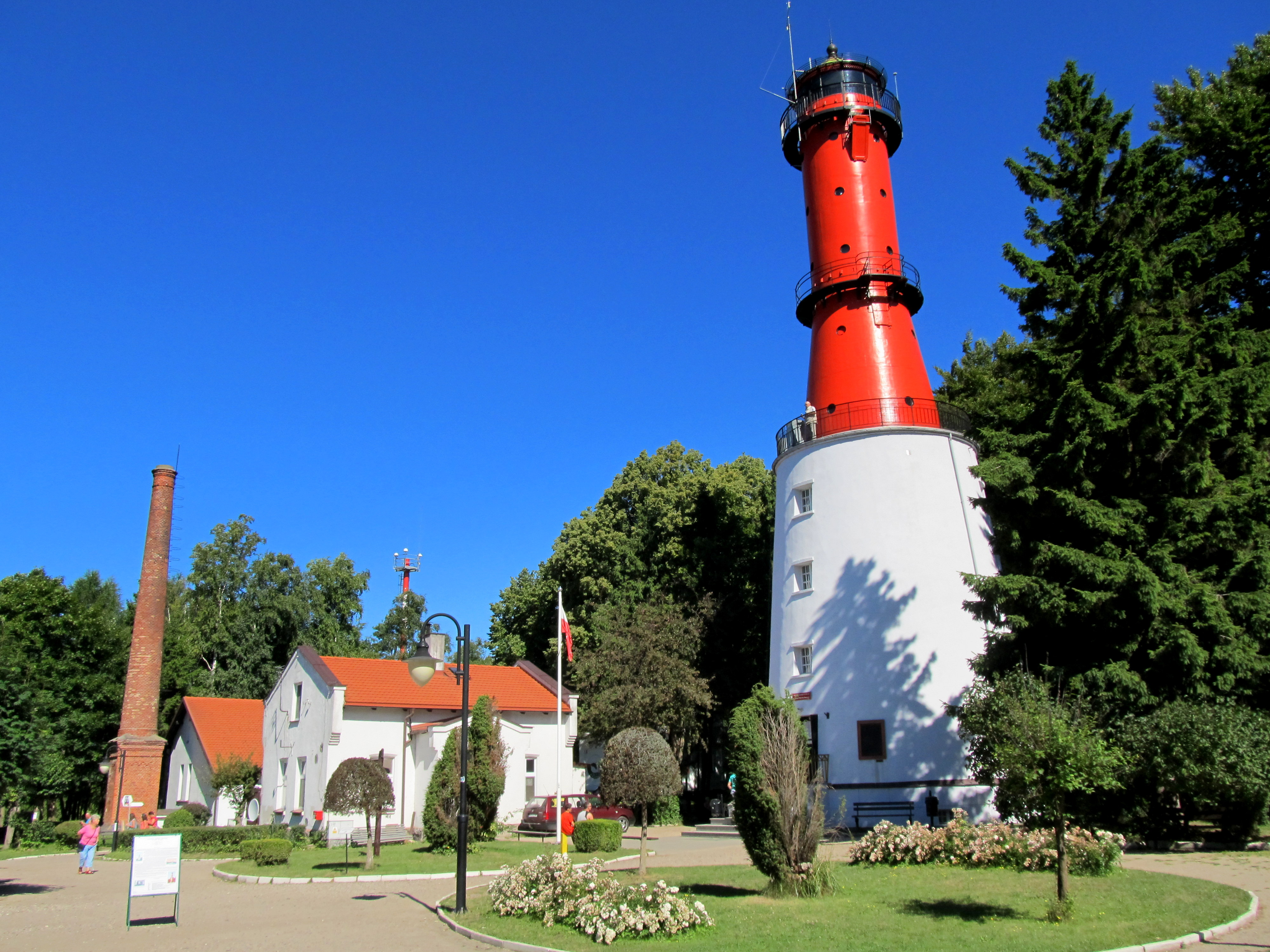 Władysławowo, latarnia morska, 1821-1822, 1910